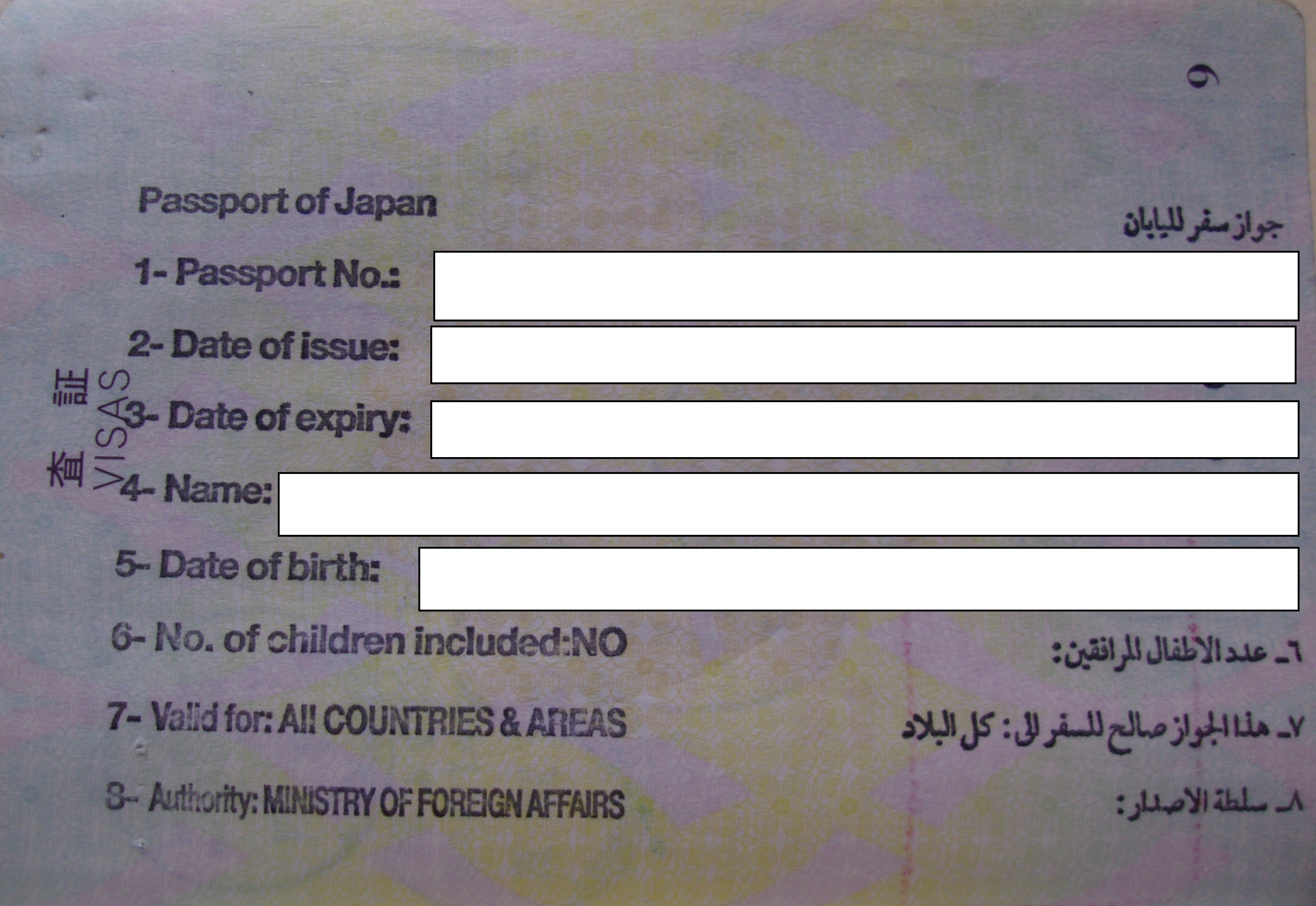 リビア渡航には旅券記載内容のアラビア語併記が必要であった